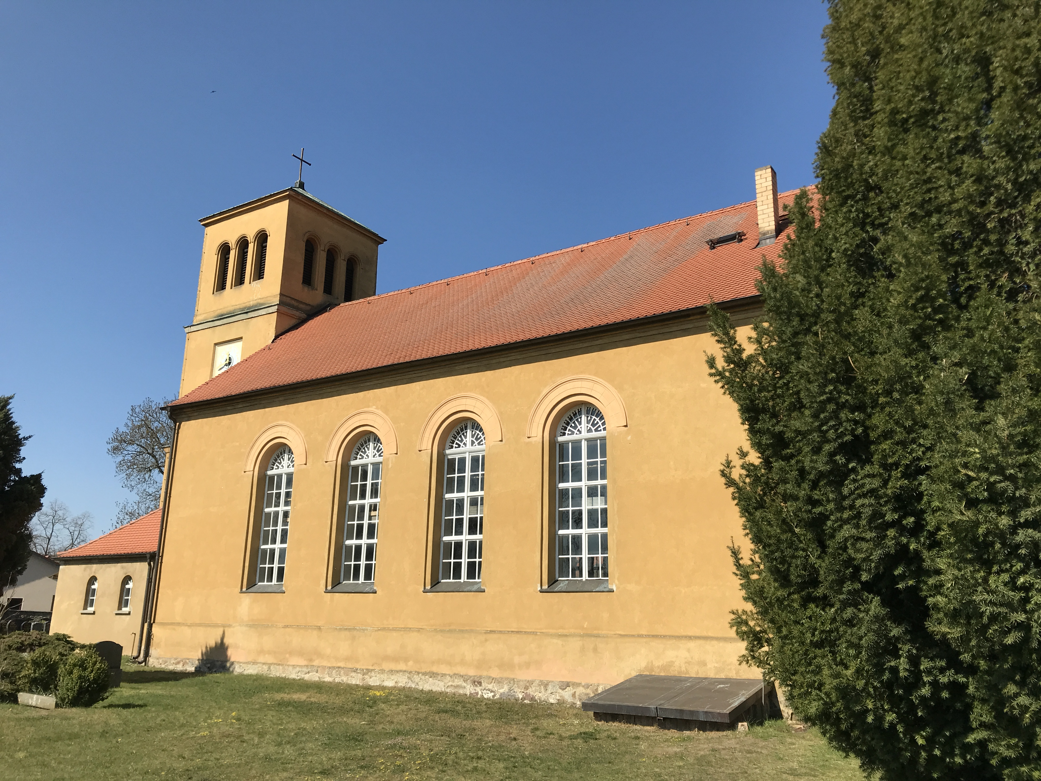 Die Dorfkirche Lütte ist eine Saalkirche aus dem Jahr 1842 in Lütte, einem Ortsteil der Stadt Bad Belzig im Landkreis Potsdam Mittelmark. Im Innern hängt unter anderem ein Gemälde aus dem Anfang des 17. Jahrhunderts.